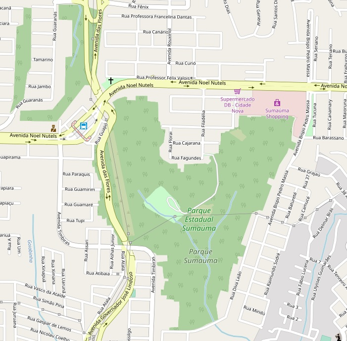 Parque Estadual Samaúma, Manaus - Brasil